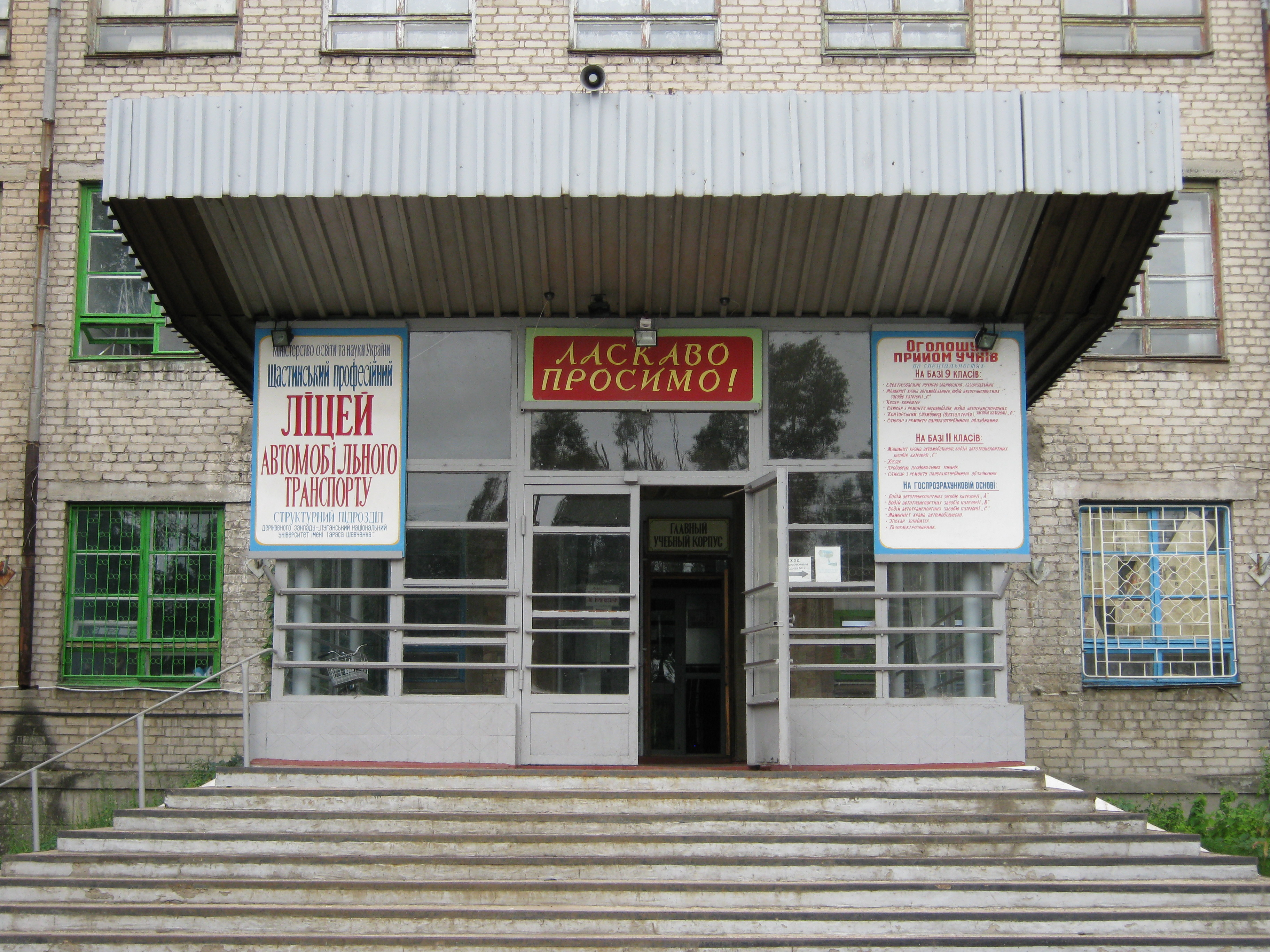 Schastia, Luhans'ka oblast, Ukraine